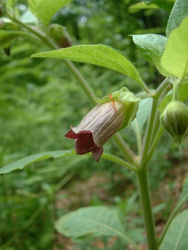 Belladonne, Auberive.